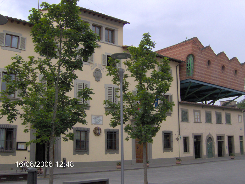 Assianir, mio lavoro, Facciata del comune di Campi Bisenzio, GNU FDL